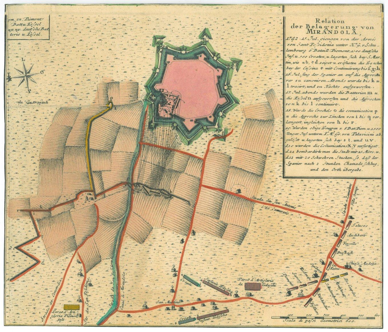 Relation der Belagerung von Mirandola, 1742 1742, 15 Jul. gienen von der Armée von Sant Possidonia unter Kn.G. von Schulembourg 6 Battaill. Piemont., 1300 deutsche Inf. U. 500 Croaten, u. lagerten sich bey S. Martin, wie a b, c d zeiget u. eröfneten die Trenchée bey der Cassina e mit Continuirung bis f, g, h 16 Jul. sing der Spanier an auf die Approchirer zu canonren. Ab ends wurde bis k u. 1 tracirt, und zu Nachts ausgeworsen. 17 Jul. abends wurden die Batterien m u. die Kessel n ausgeworfen un die Approchen von k bis 1 continuirt. 18 wurde die Crochels O die comunication p u die Approche zur Licken von 1 bis q verlangert von h bis r. 19 wurden obige Trouppen v. 8 Bat. Piem. U. 2500 Ungar. Inf. Unterm F. Ml. Gr. Von Palavicini ab. Gelöset u. lagerten sich bey s, t, und u v d. 20 wurden die Comunications X Y verferiget. d. 22 bombardirte man die Stadt mit 15 Mors. u. d. 22 mit 20 Schwechren Stucken sod ass der Spanier nach 2 Stunden Chamade schlug, und den Orth übergabe.